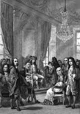 Fondation de l'Académie Française